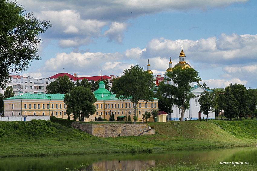 Полацк. Мужчынскі Багаяўленскі манастыр